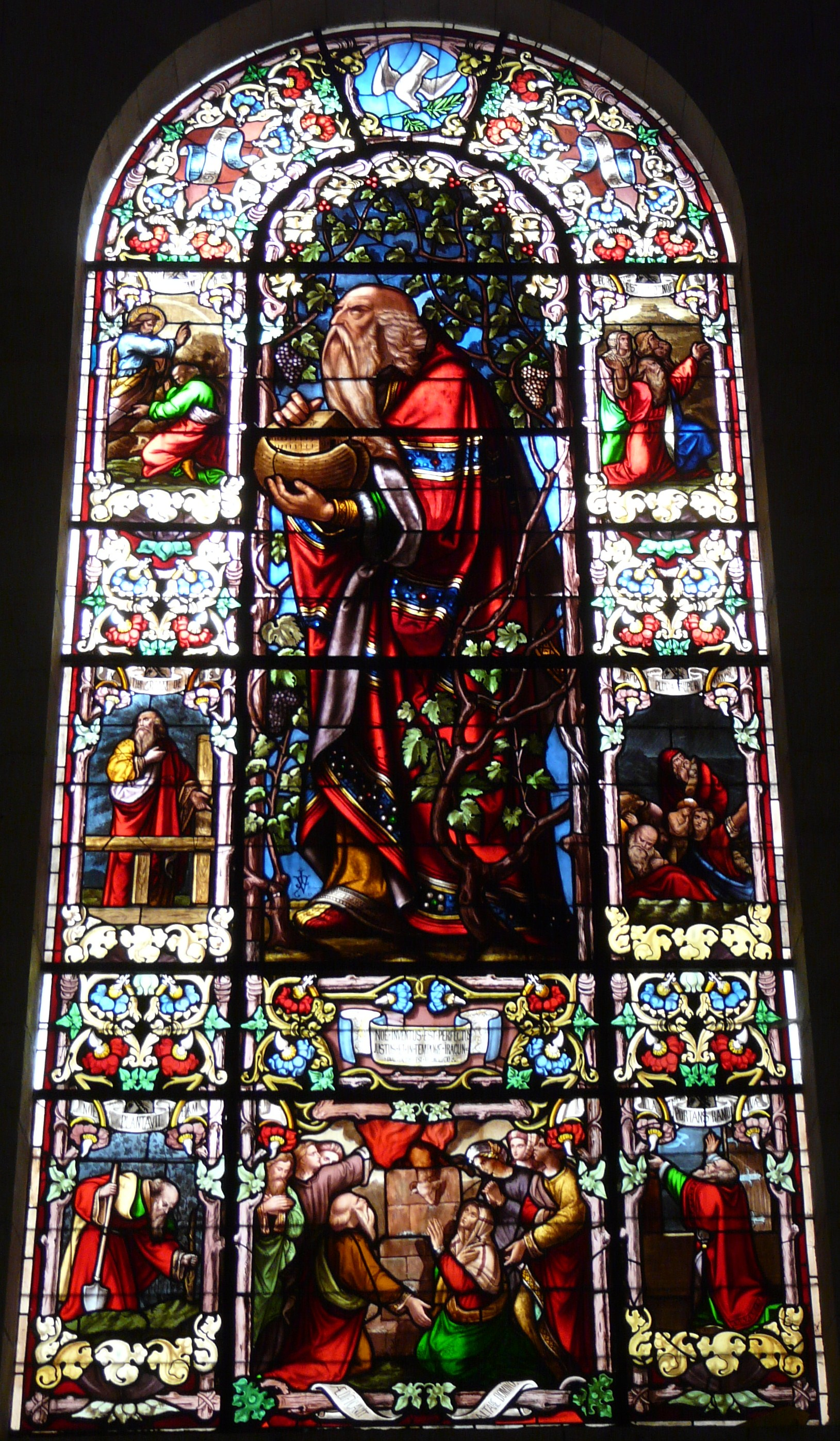 Représentation de Noé, œuvre de Joseph Villiet, vitrail de la nef, église Saint-Nicolas, Nérac, Lot-et-Garonne, France.